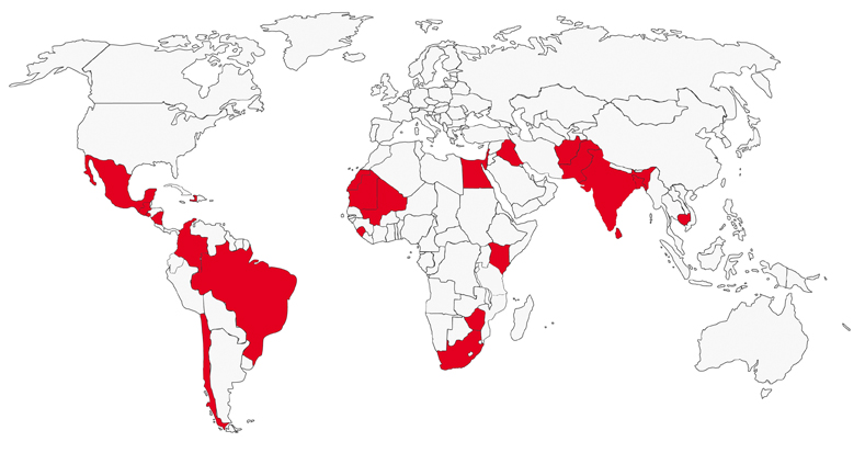 Die Projektländer von medico international